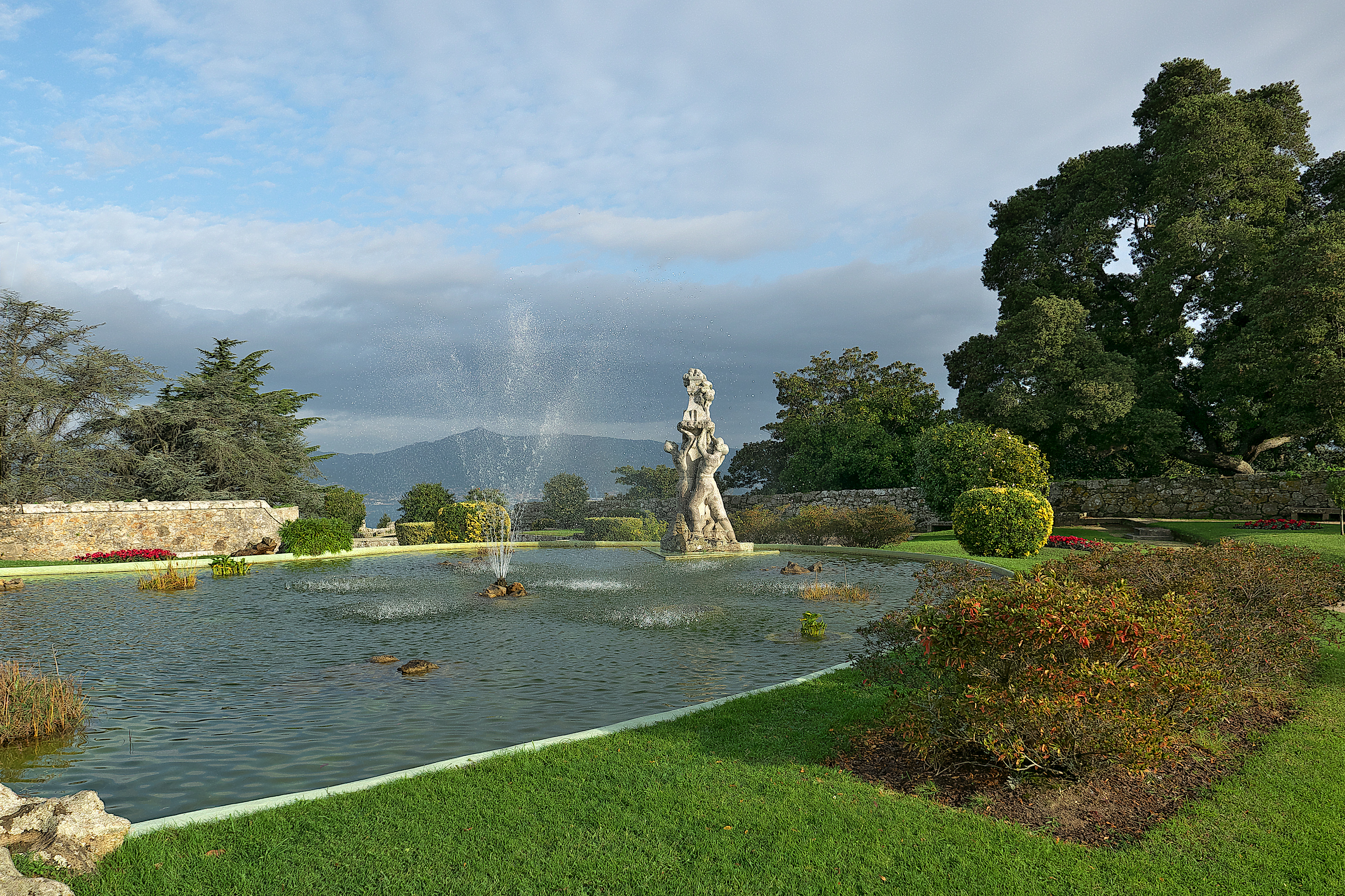 Jardines en el recinto de la fortificación.